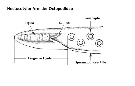 Beschreibung eines Hectocotylus der Gattung Octopodidae